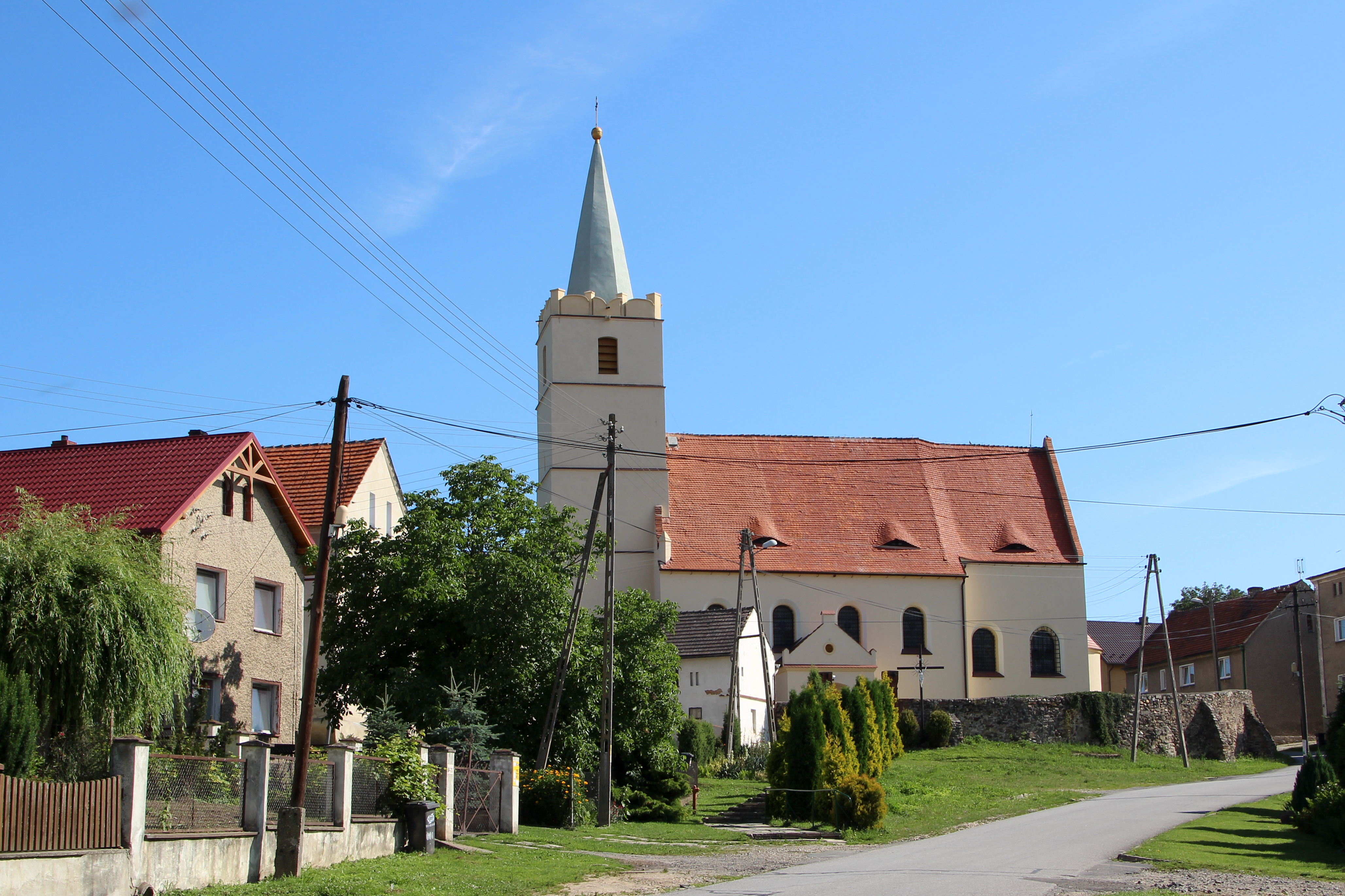 Kościół par. pw. św. Mikołaj w Wierzbięcicach, gmina Nysa.